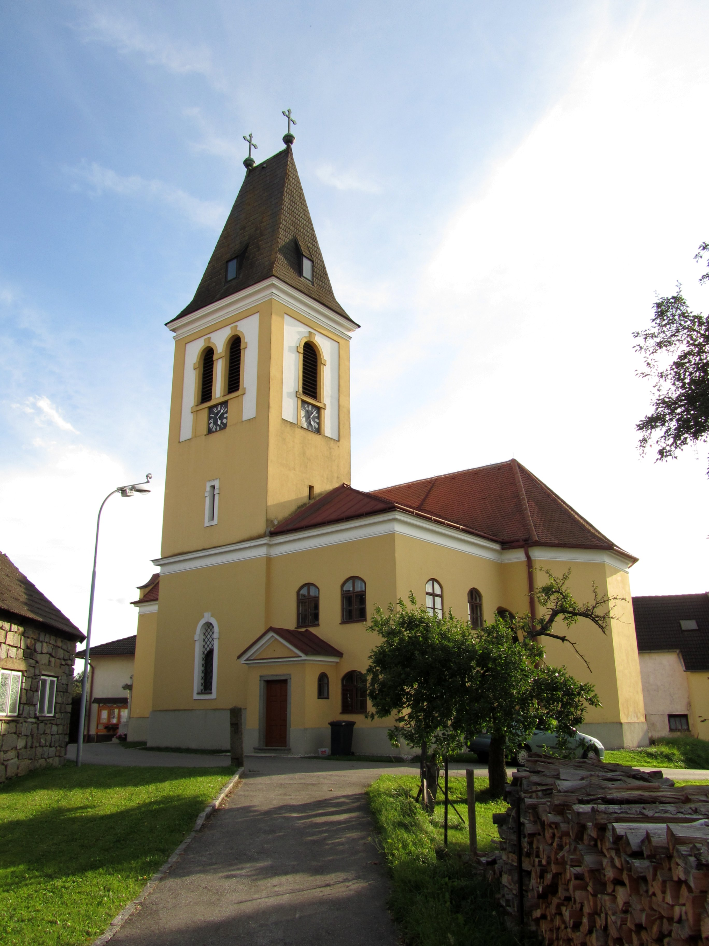 Kath. Pfarrkirche hl. Margareta